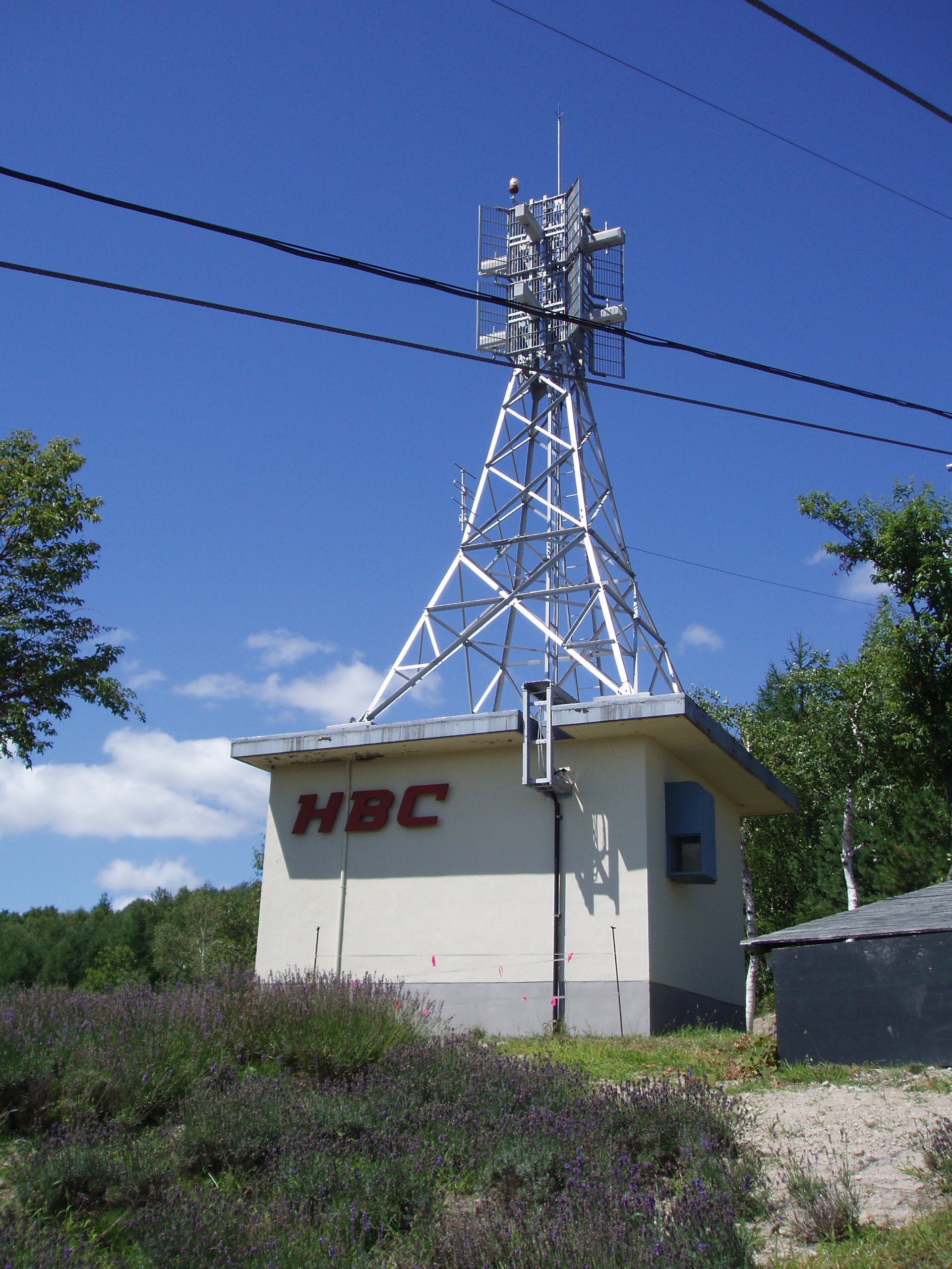 富良野（中富良野）中継局 HBC送信設備